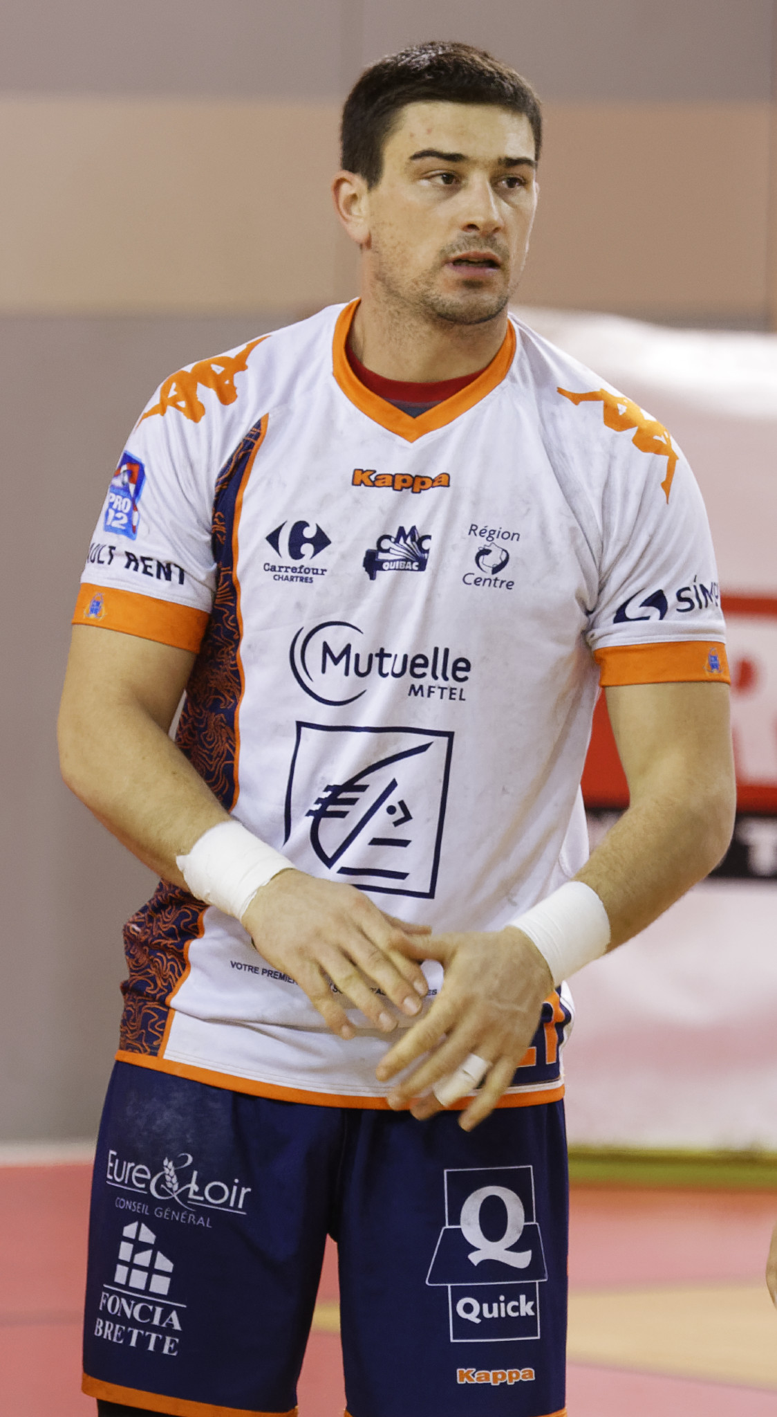 Rencontre de ProD2 entre l'US Ivry handball et Chartres HB. A Ivry, le 06 décembre 2014.